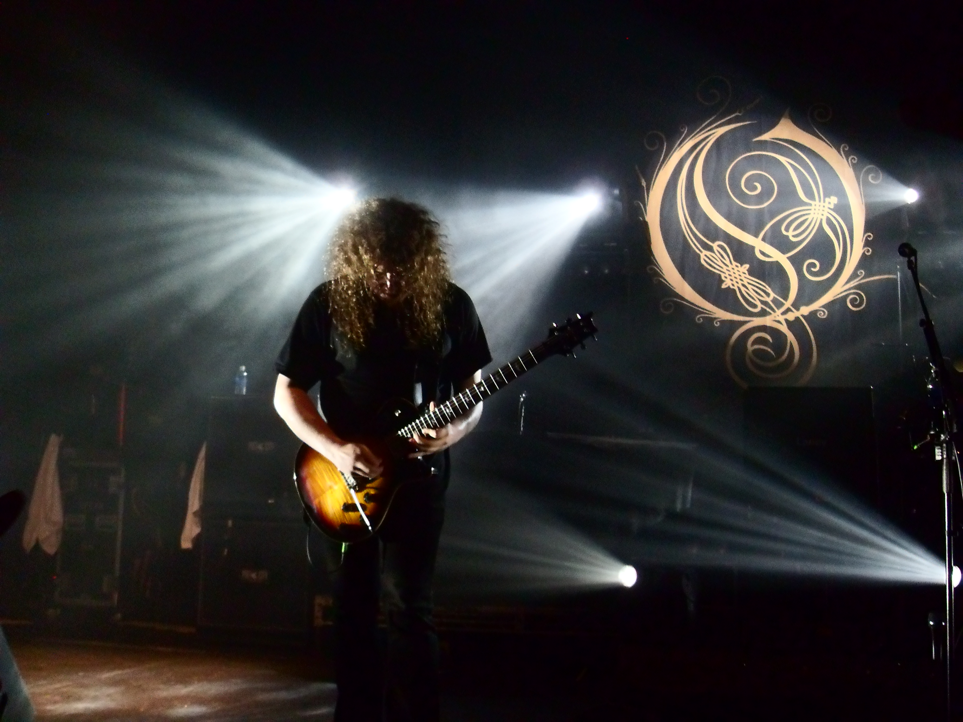 Fredrik Akesson